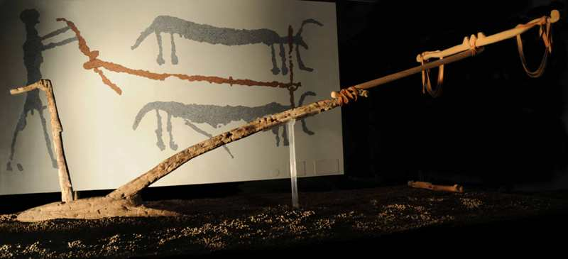 Ceppo-vomere caratterizzato da un foro quadrangolare per l'inserimento della stegola con impugnatura a manubrio. La bure si diparte dal ceppo con un'inclinazione di circa 45 gradi con estremità distale lavorata in modo da permettere l'aggancio della stanga di prolungamento (non rinvenuta nello scavo).